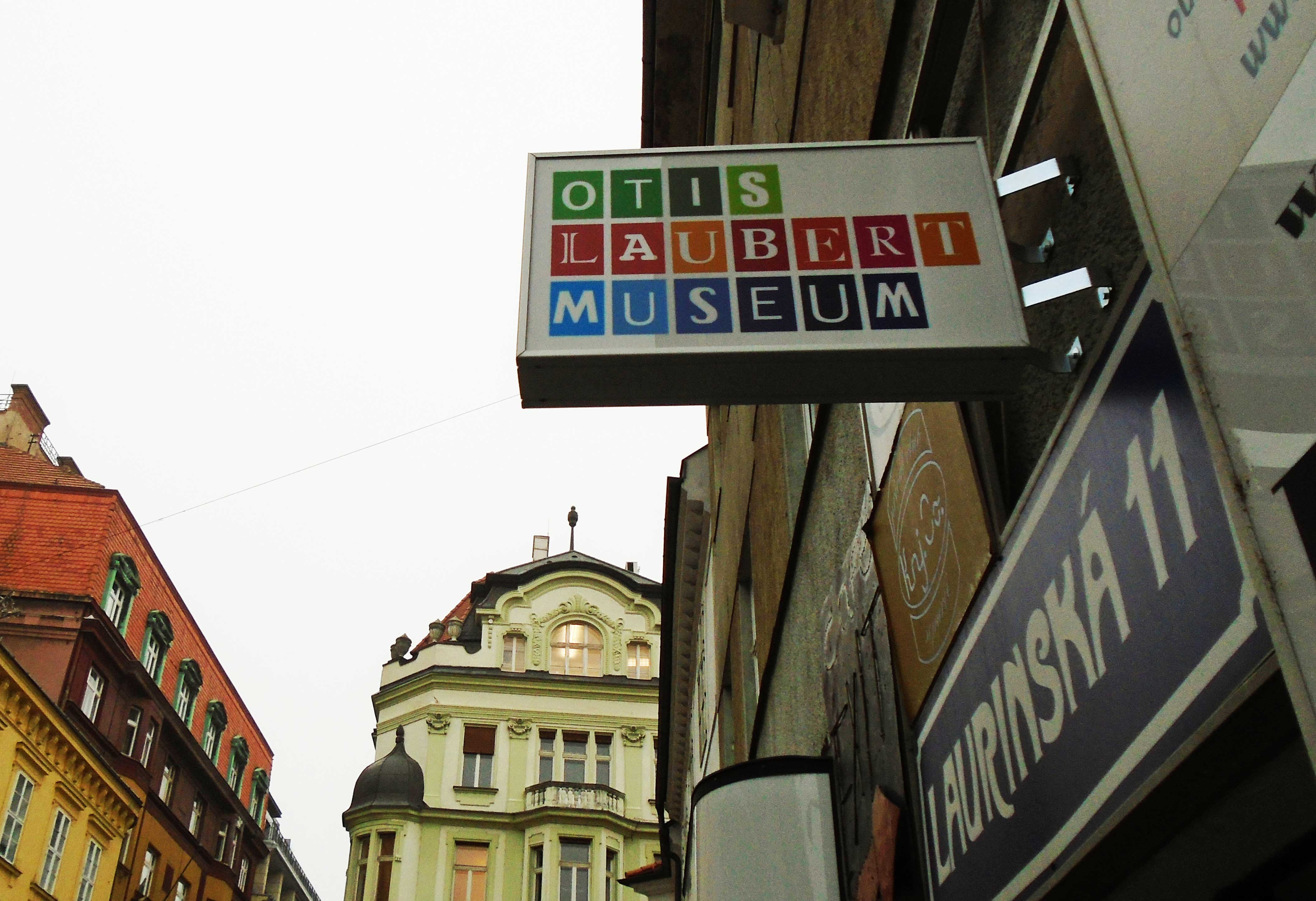 Múzeum Otisa Lauberta v Bratislave